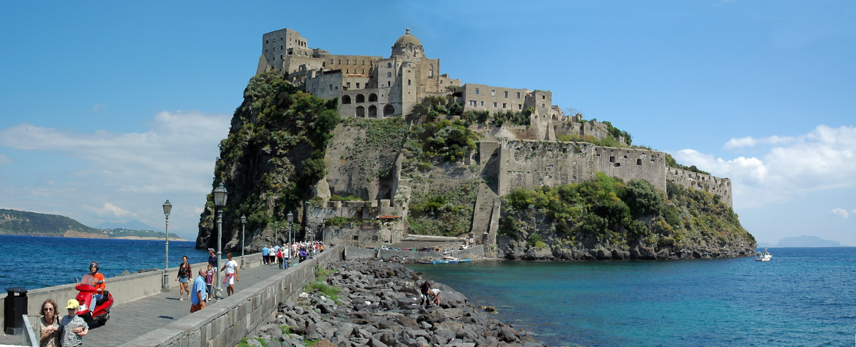 Castello Aragonese von Ischia, links Vesuvio, rechts Capri